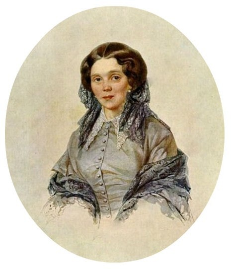 Дарья Петровна Оболенская, ур. Трубецкая (1823—1906), жена князя Дмитрия Александровича Оболенского (1822—1881)